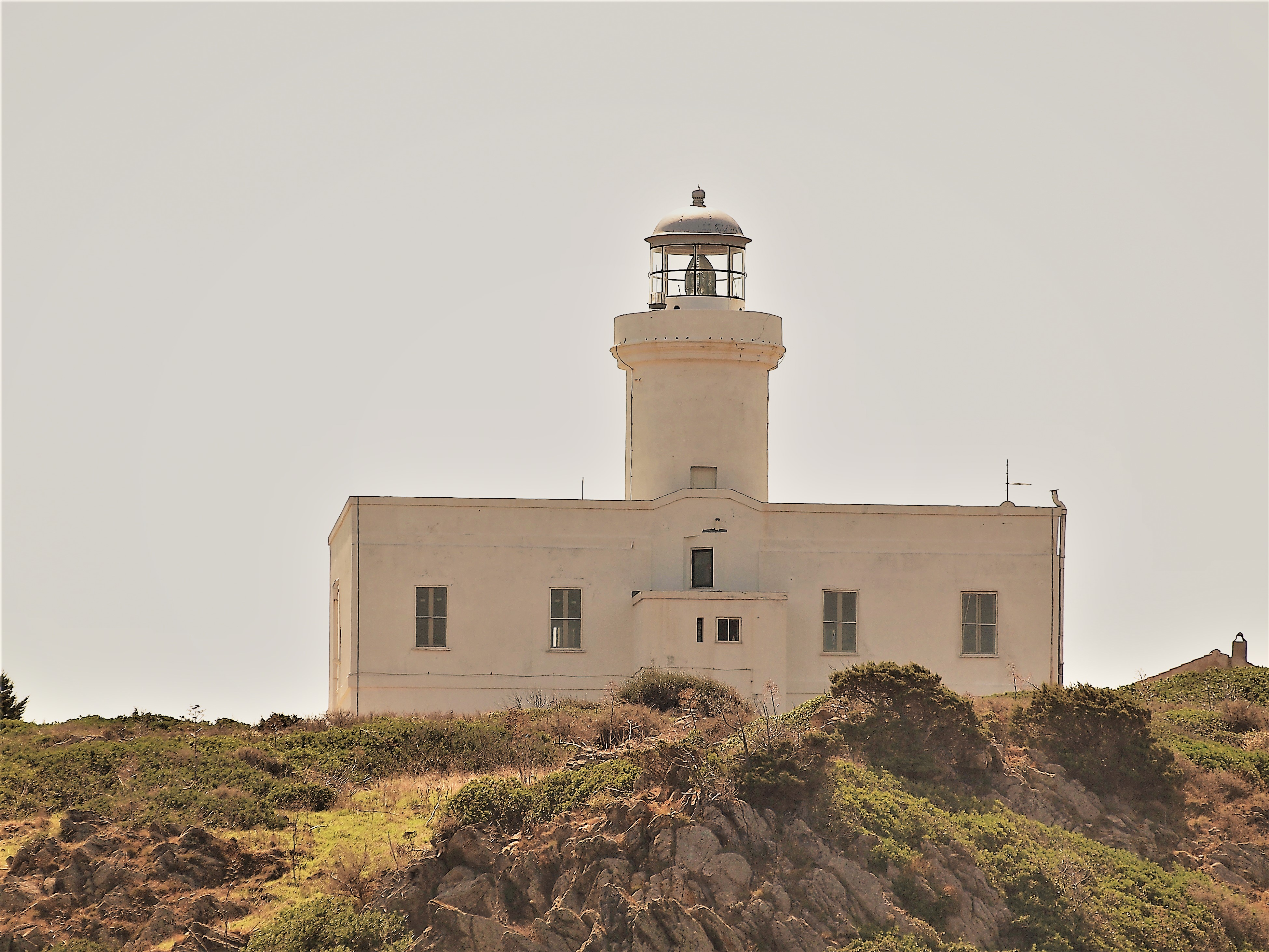 Leuchtturm am Capo Ferro, Nordseite, Nord-Sardinien (41°09.3'N 9°31.4'E)